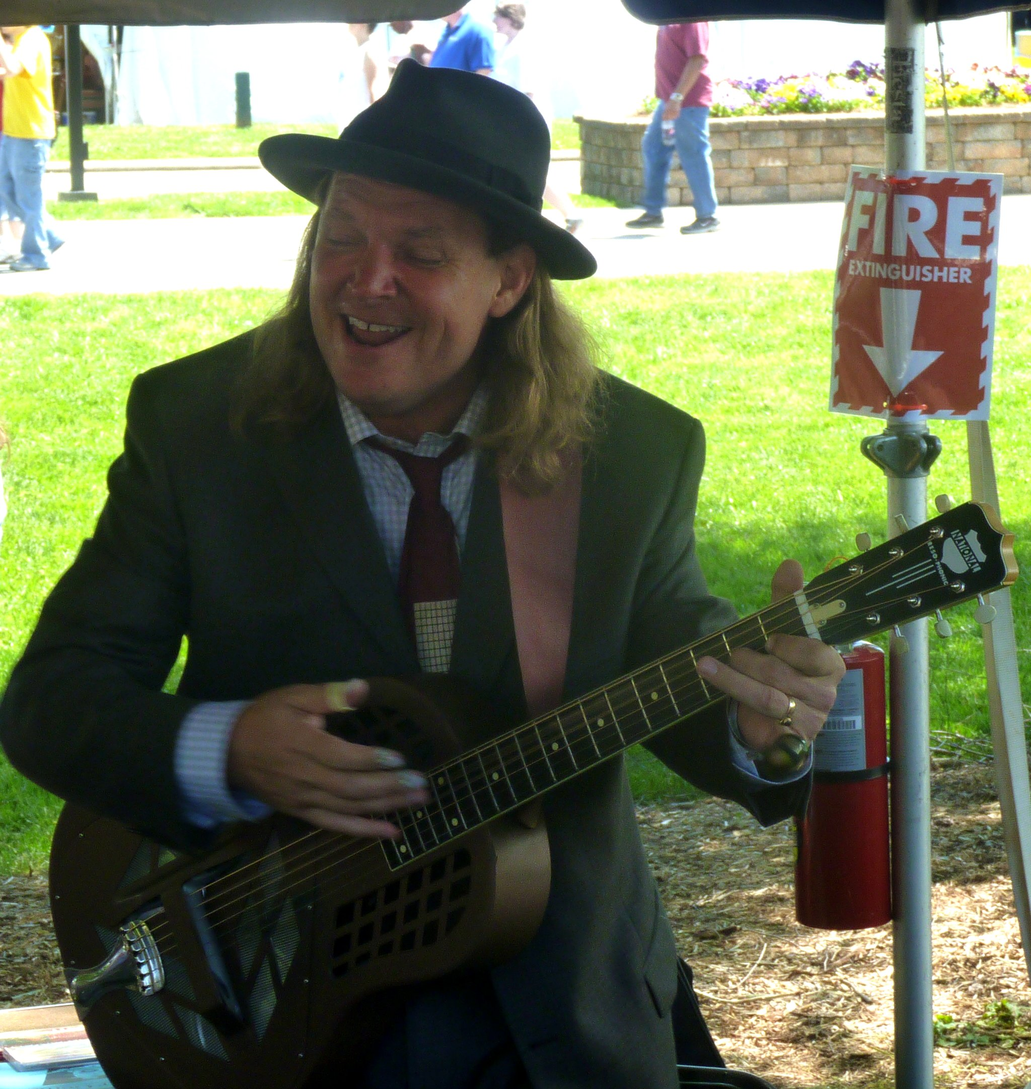 Pickin' tent MerleFest 2011